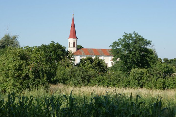 Kostel sv. Antonína - pohled od Hrabětické kalvárie